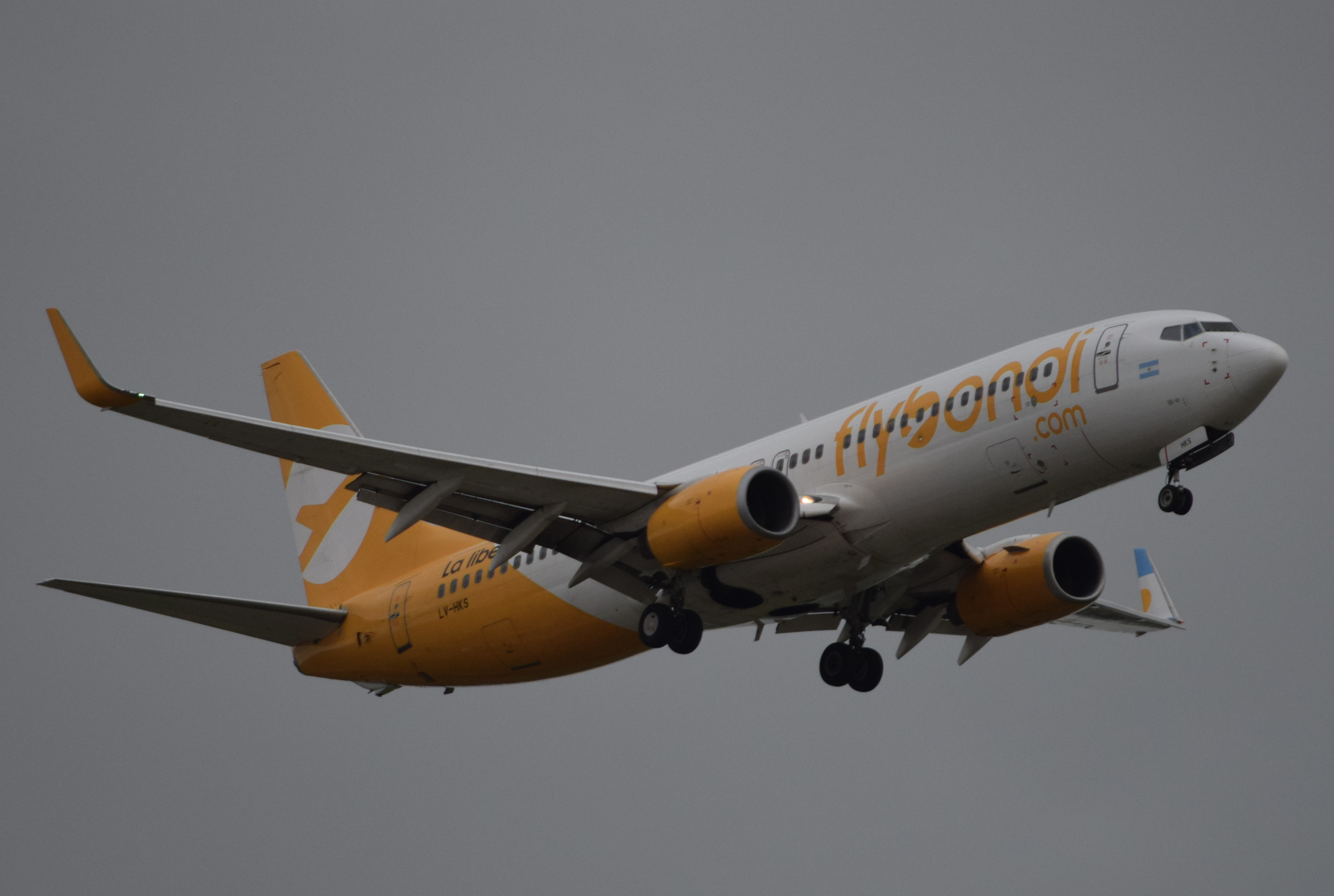 Boeing de FlyBondi luego de despegar del aeropuerto El Palomar.